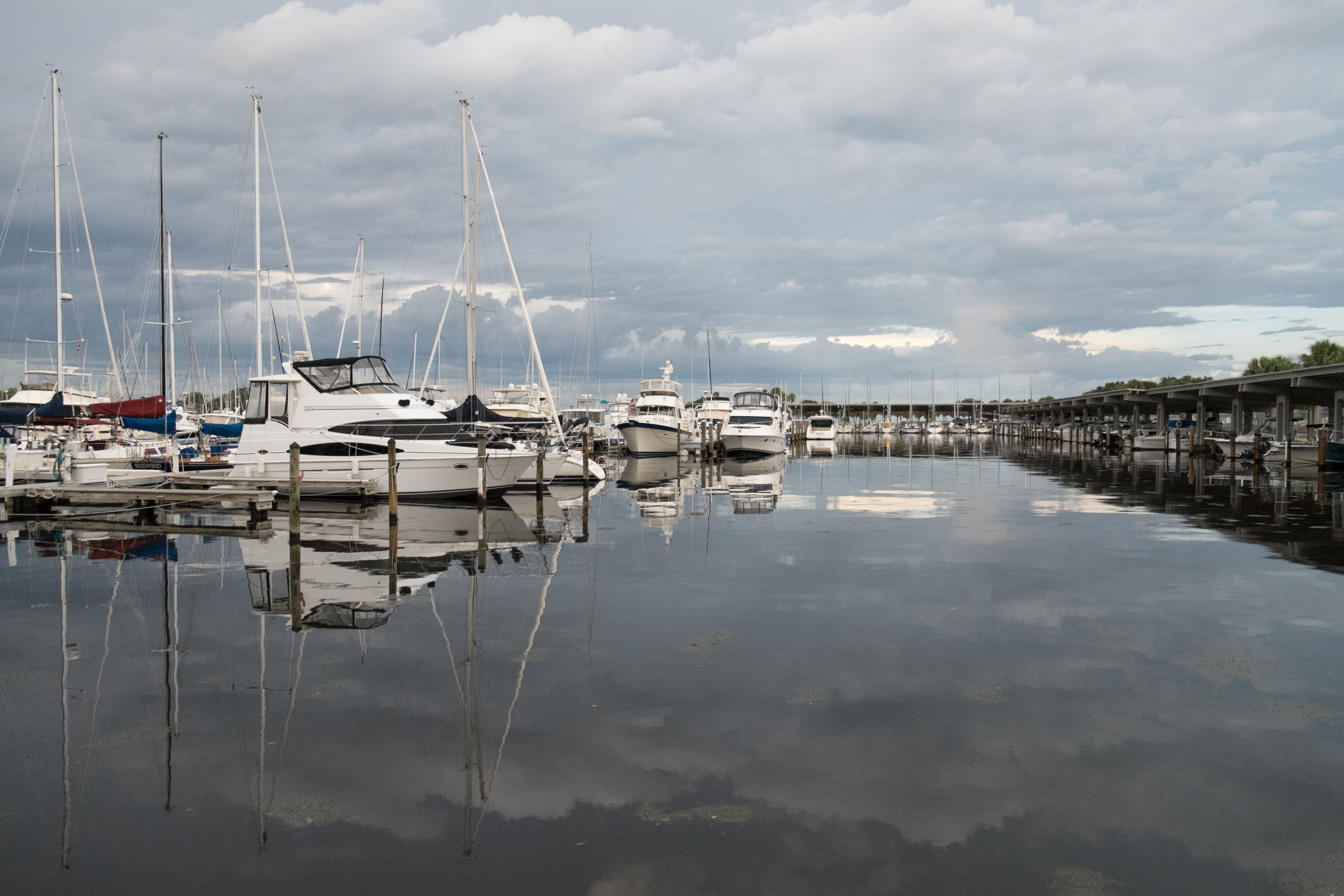 St. Pete Yacht Club